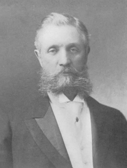 scanned image